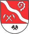 Wappen der ehemaligen Gemeinde Pitschgau, Steiermark